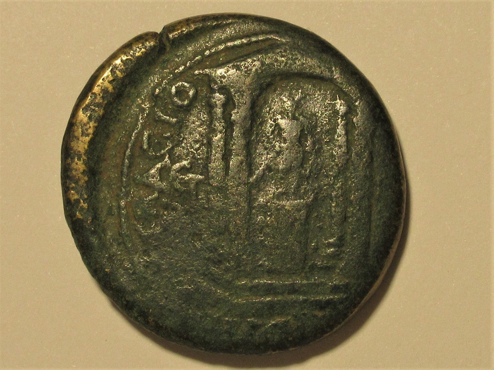 Bronzemünze z.Zt. der Severer, Sebastopolis Pontus, Price/Trell, Coins and their cities, S. 212 Fig. 443